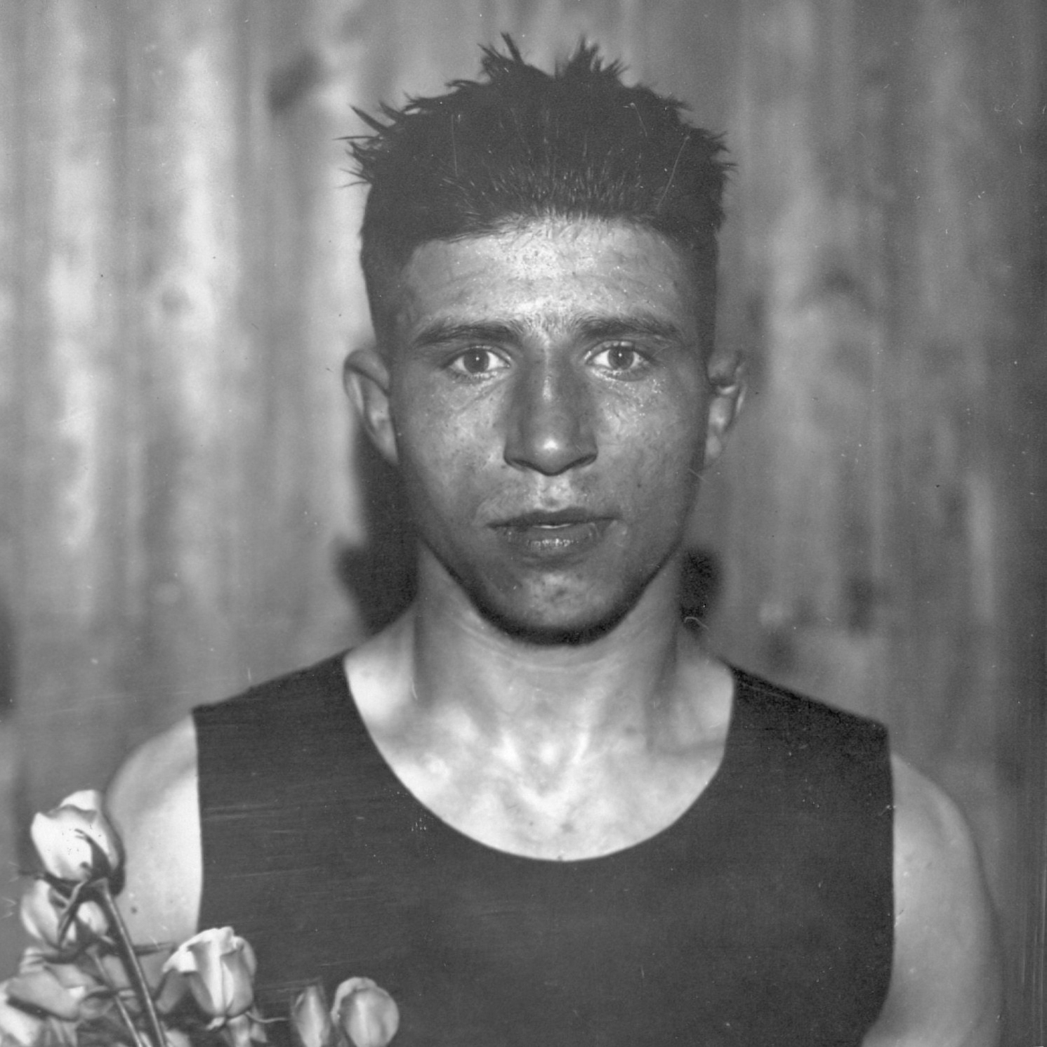 Boksen, Lambertus " Bep" van Klaveren (rechts), vedergewicht tot 57, 152 kg. Goud op de Olympische Spelen 1928 Amsterdam. 1928